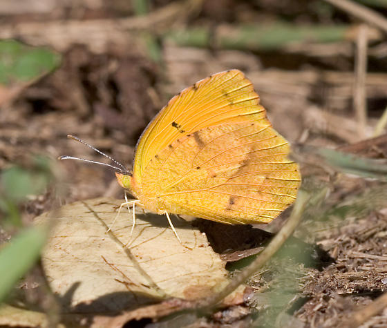 Abaeis nicippe